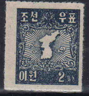 アメリカ合衆国南朝鮮軍政府が発行した2ウォン切手